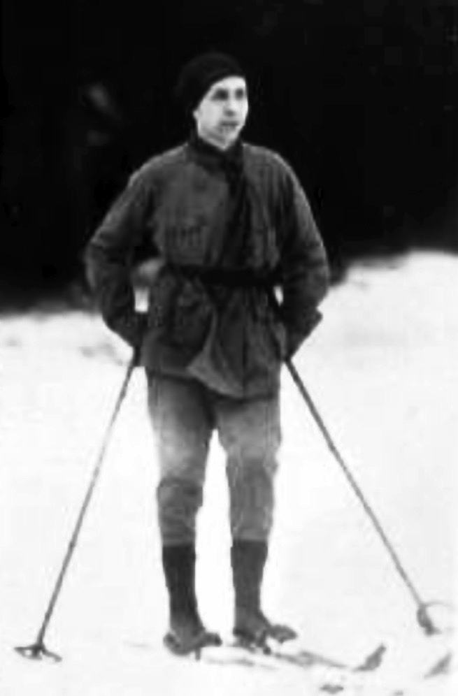 Ulrich Becher (1910–1924) bei einem Ausflug mit Skiern.